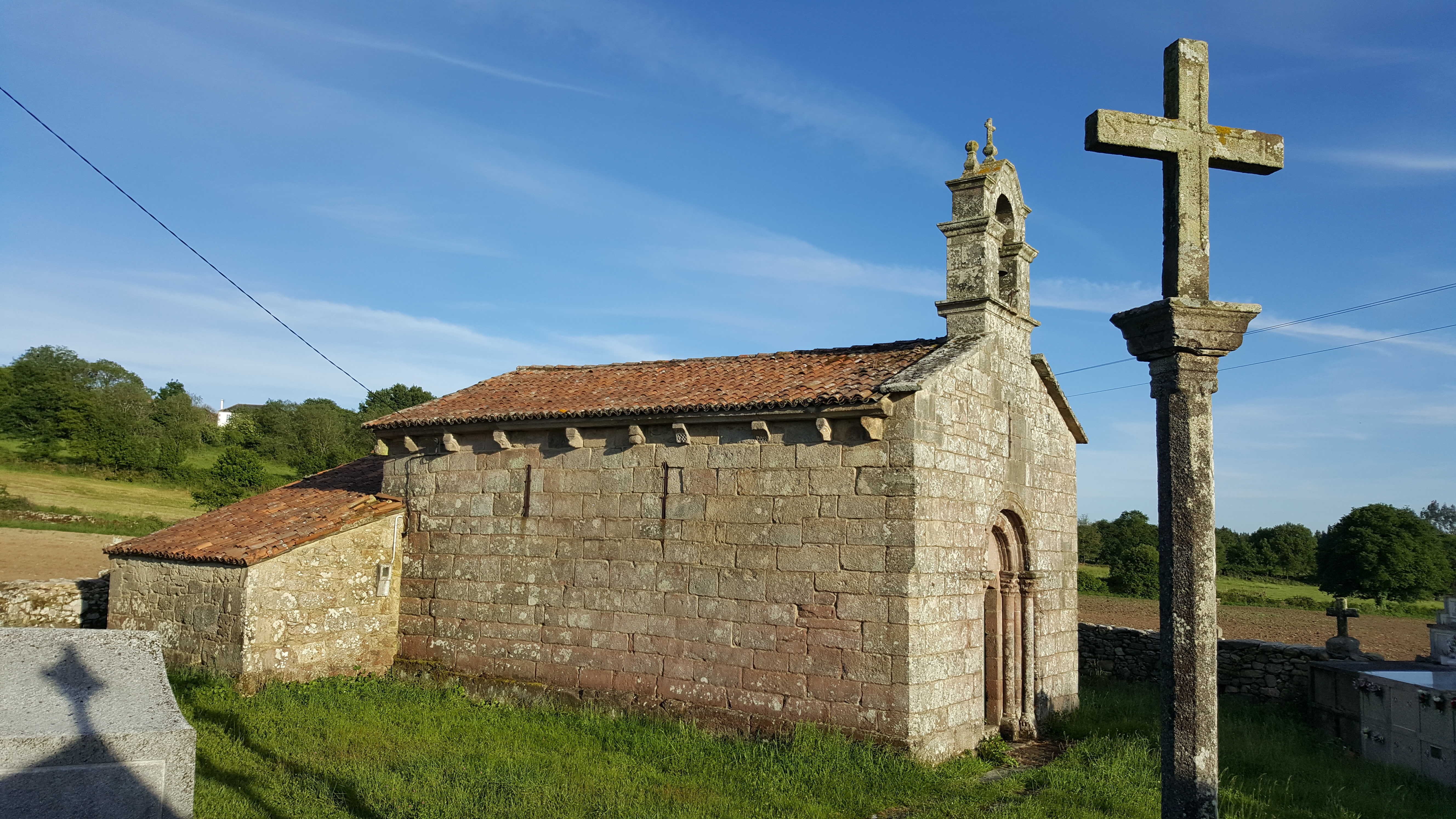 Igrexa parroquial de Santa María de Tarrío (Monterroso)